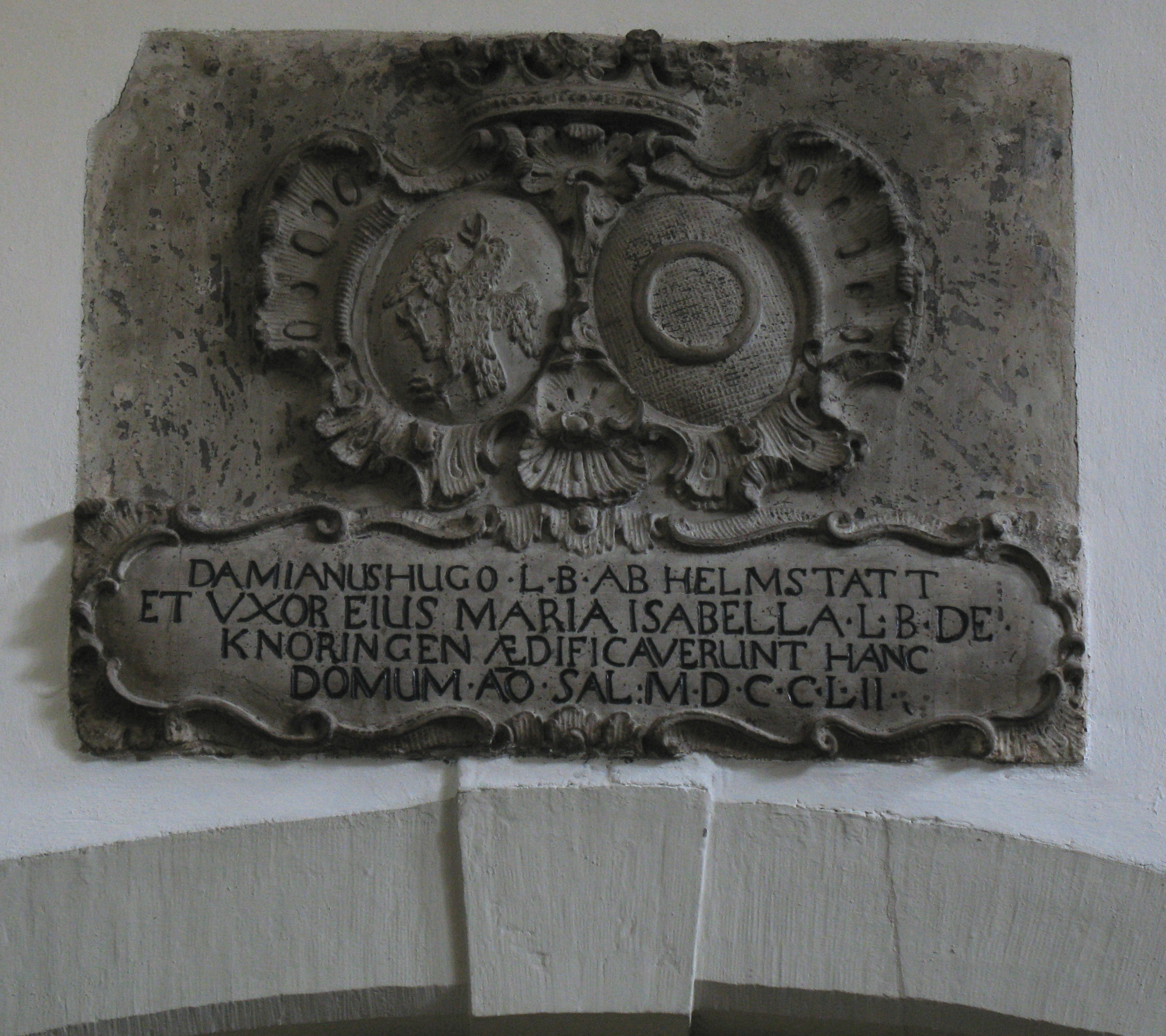 Ehewappen von Damian Hugo von Helmstatt und Isabella von Knöringen von 1752 am ehemaligen Eingangsportal von Schloss Hochhausen. (lat. "L.B." = "liber baro", "Freiherr"; lat. "ET UXOR EIUS", "und seine Gattin"; lat. "AEDIFICAVERUNT HANC DOMUM", "erbauten dieses Haus"; lat. "AO. SAL:" = "anno salutis", "im Jahr der Erlösung"; lat. "MDCCLII", "1752")